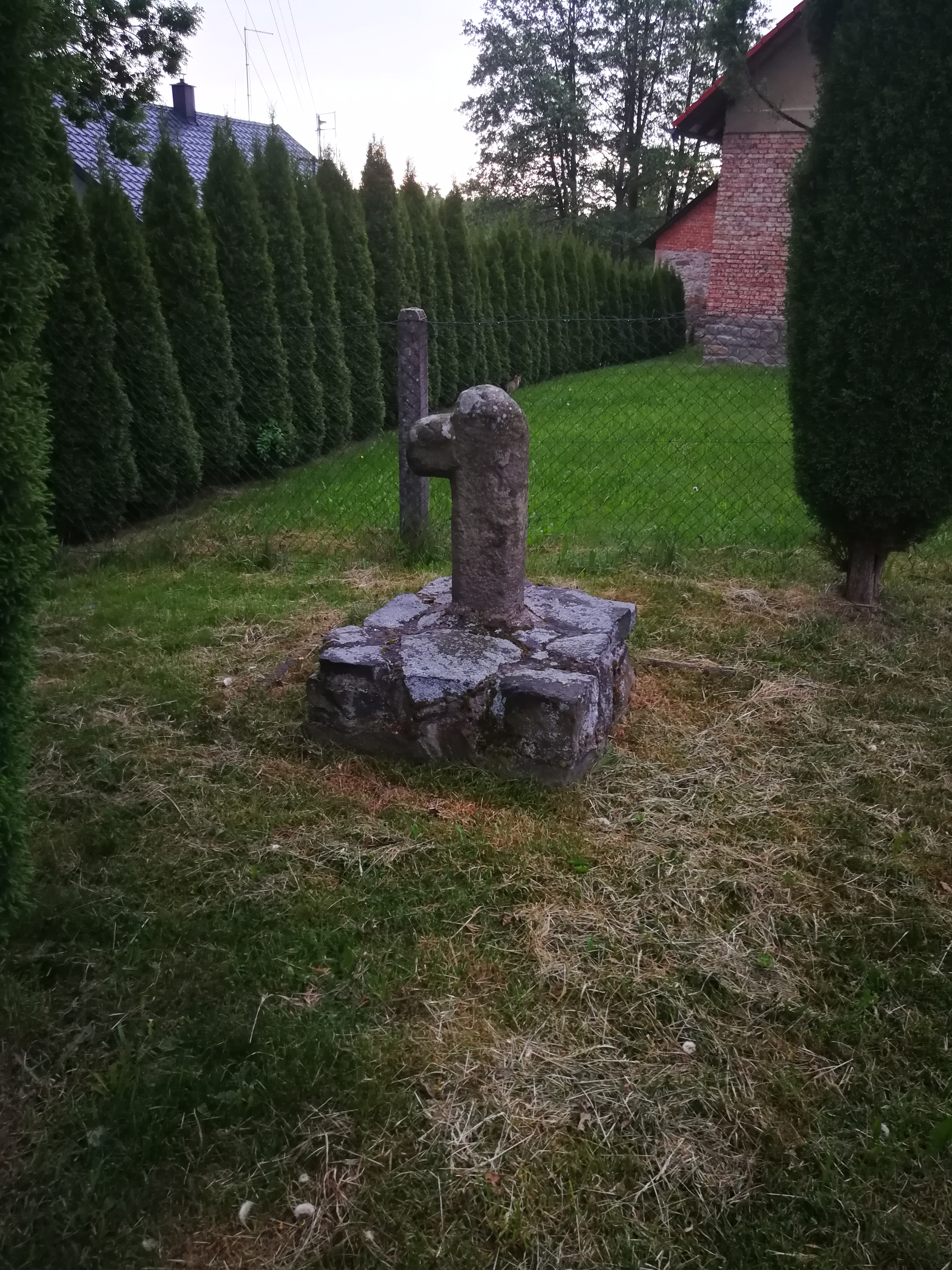 Kříž, Poděbaby